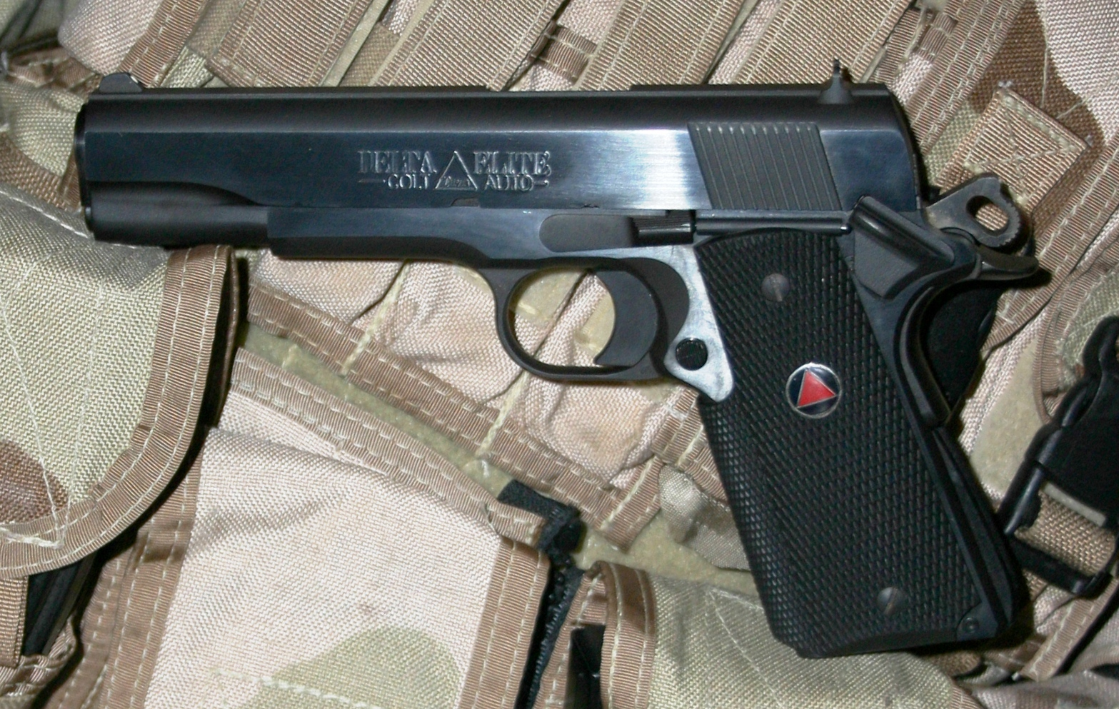 Colt Delta Elite pistol